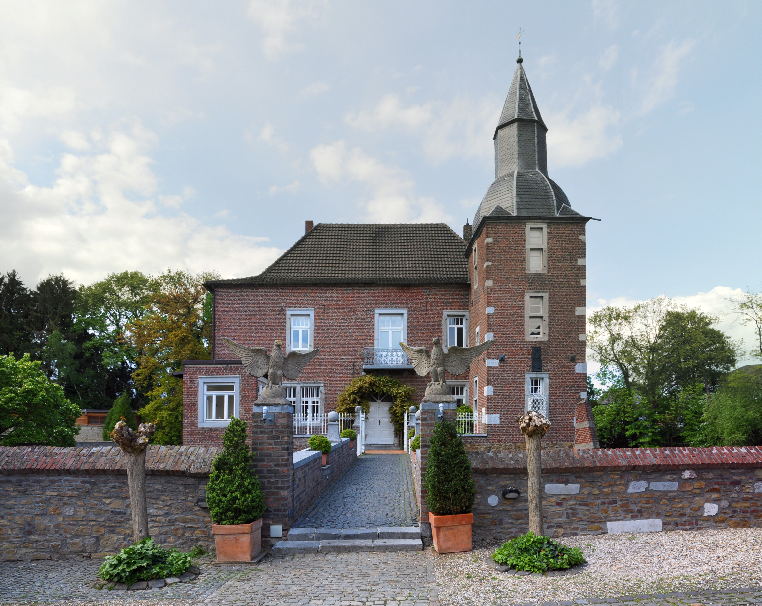 Hauptgebäude des Hauses Kambach in Eschweiler, Südansicht